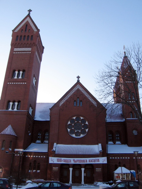 Чырвоны касцёл, упрыгожаны да свайго 100-годдзя